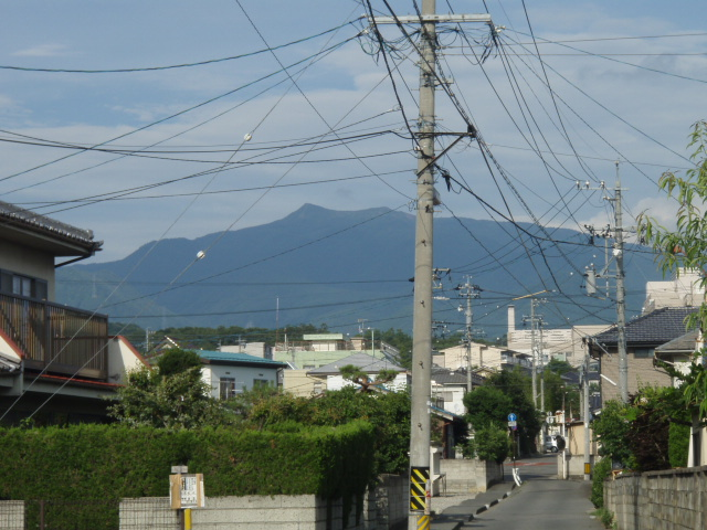 長野県上田市より望む烏帽子岳